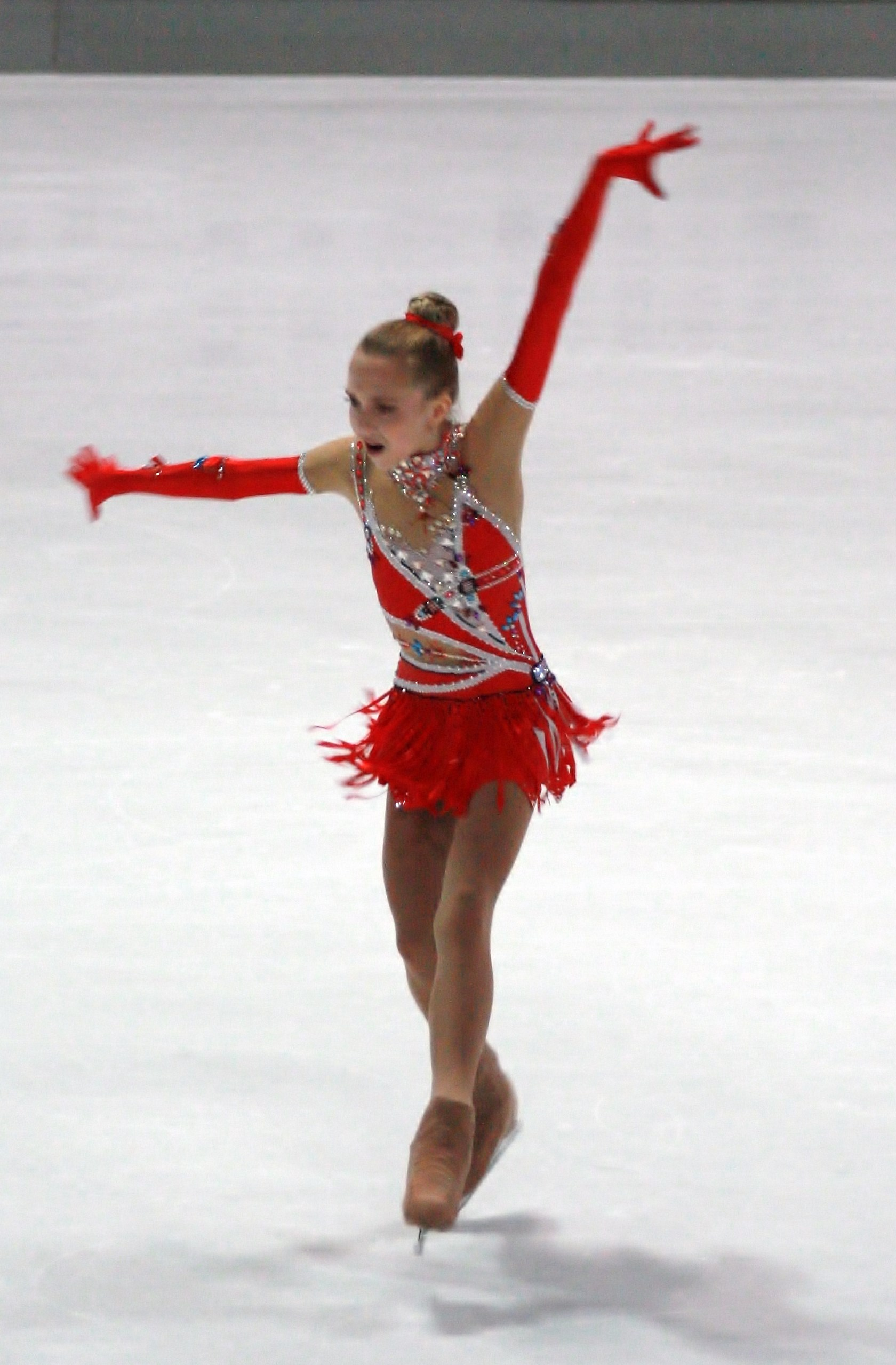 Елена Радионова (Россия) на 2013 Nebelhorn Trophy.